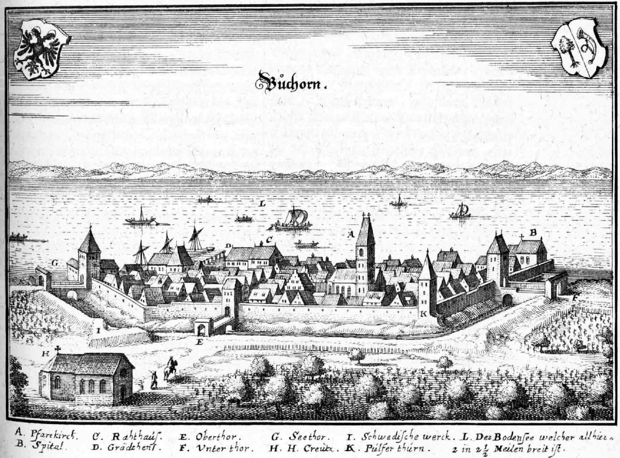 Kupferstich von Buchorn/Buchhorn/Friedrichshafen am Bodensee, Deutschland